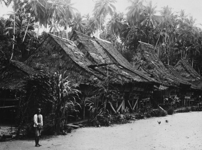 Foto. Woonhuizen in een dorp op Poelau Telo